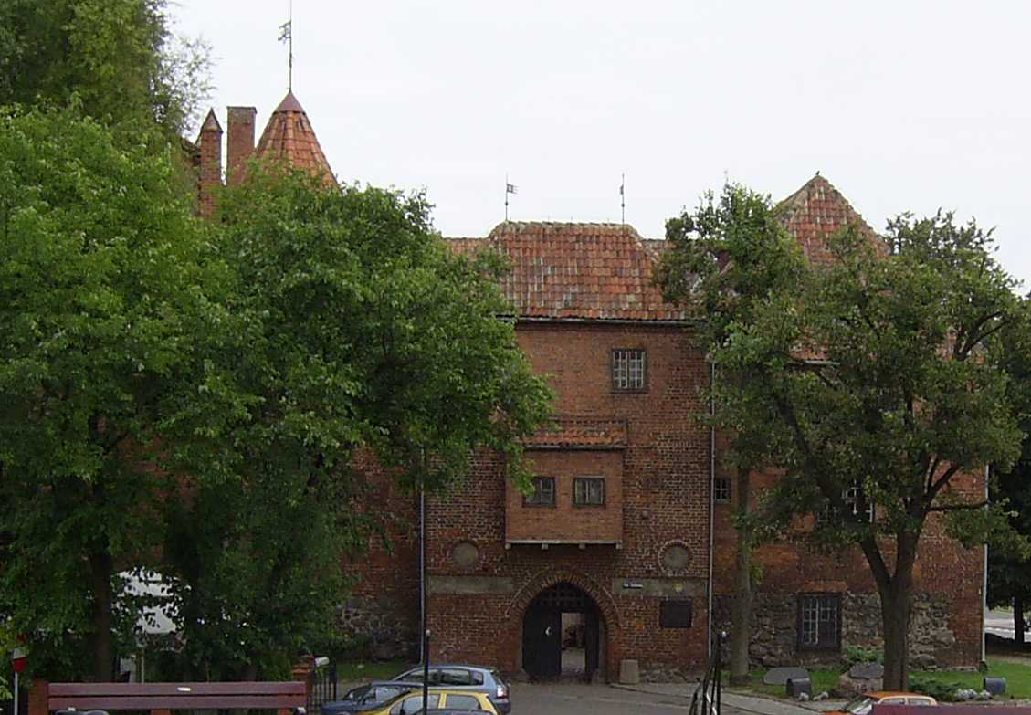 Die Burg in Kętrzyn (Rastenburg).